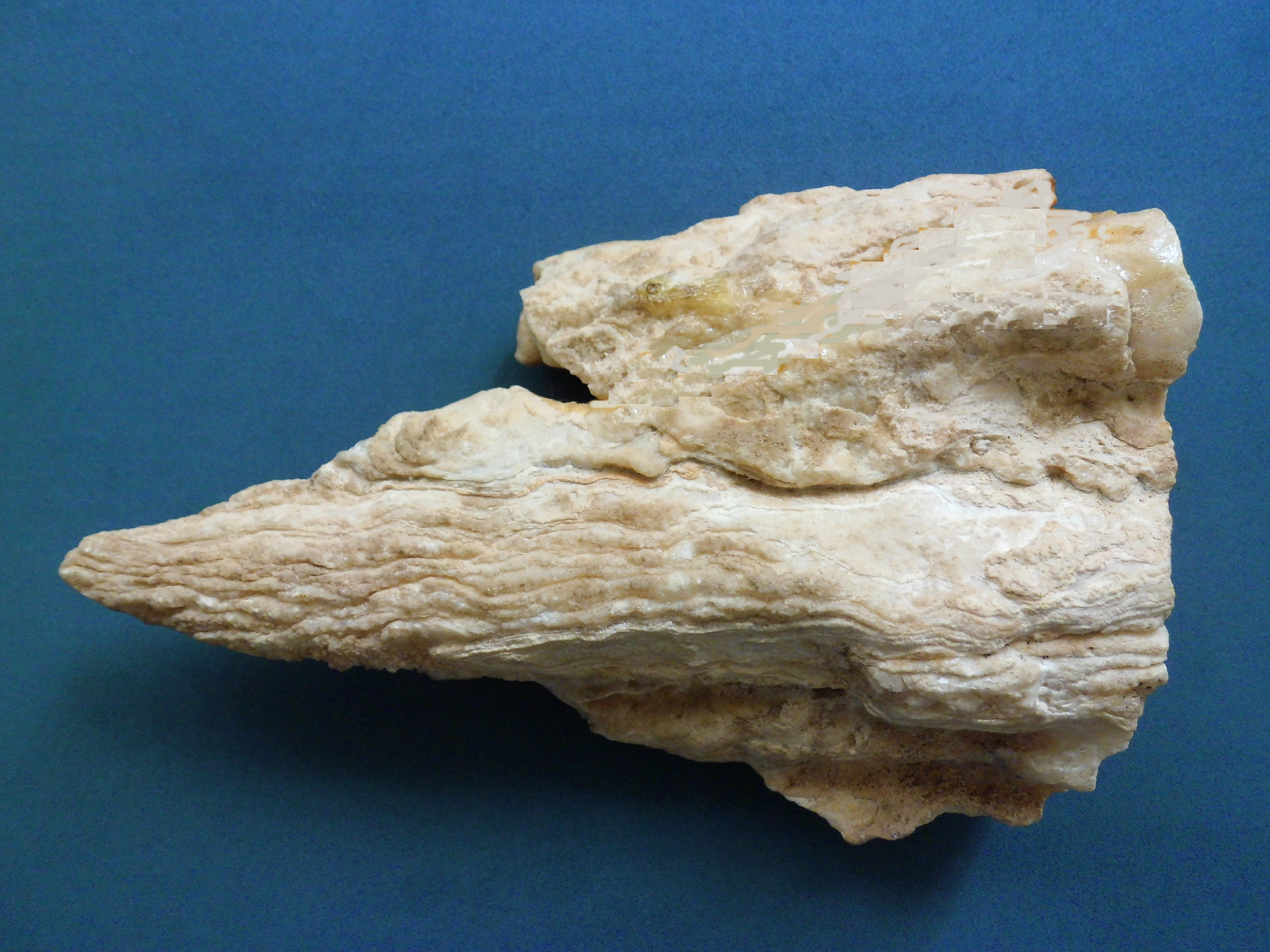 Estalactita de la cueva Ricardo Zuloaga, localiza en el Peñón de las Guacas o de los Carraos, en el sector Los Naranjos al Este de la Urbanización La Lagunita en el municipio El Hatillo del estado Miranda - Venezuela (10º26´03’’N – 66º46´39´´O).